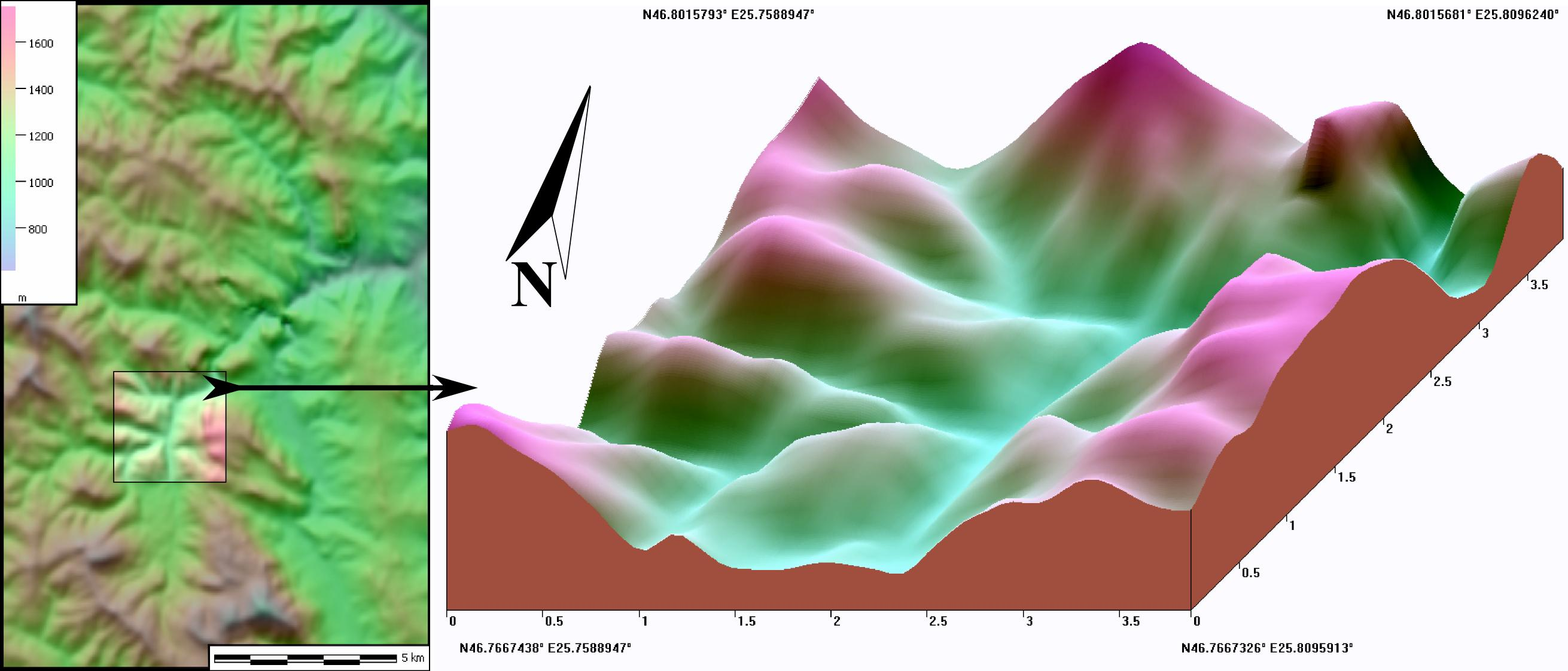 Relieful la Lacul Roşu. Imagine realizată cu date SRTM furnizate liber de NASA.